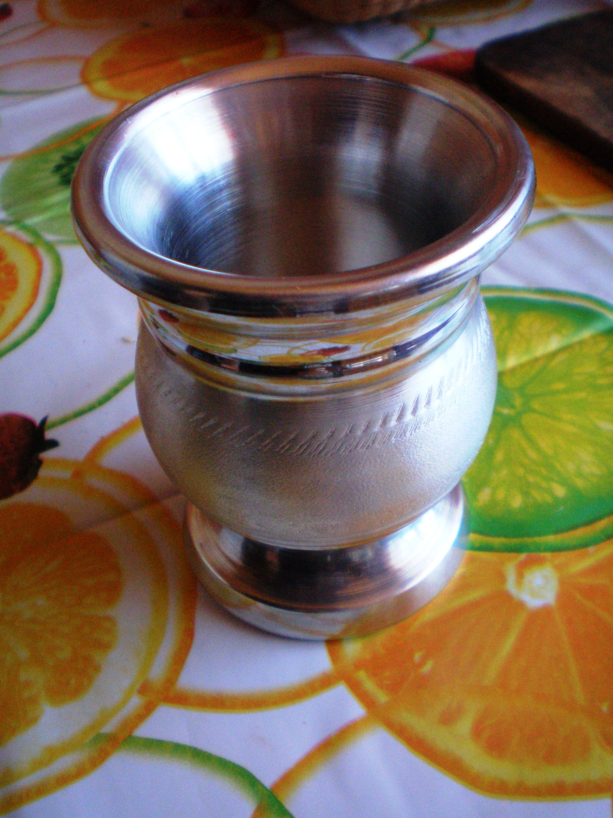 Un calabaza (o guampa?) para tomar el mate de Paraguay